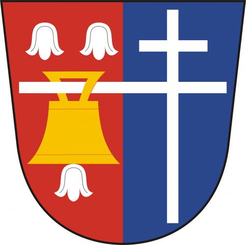 Řepníky znak